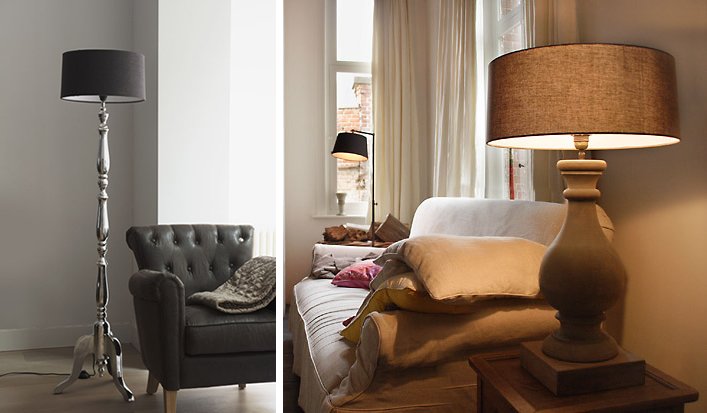 schemerlamp